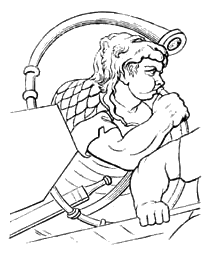 Römischer Buccinabläser